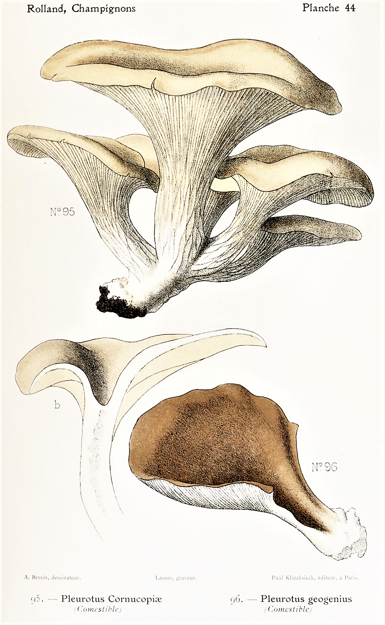 Pleurotus cornucopiae Rolland und Pleurotus geogenius Gillet